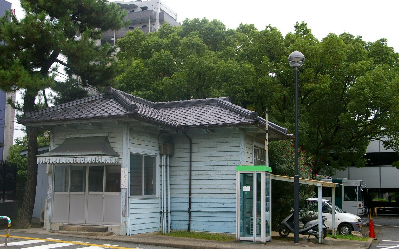 福岡市内で撮影